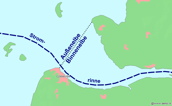 Binnenelbe, Außenelbe. Blaue Linie = Stromrinne, schwarze Linie = seewärtige Grenze der Binnenelbe